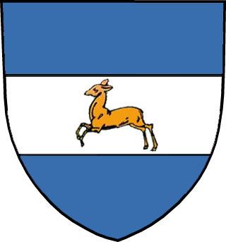 Vapensköld för svenska adelsätten Rålamb